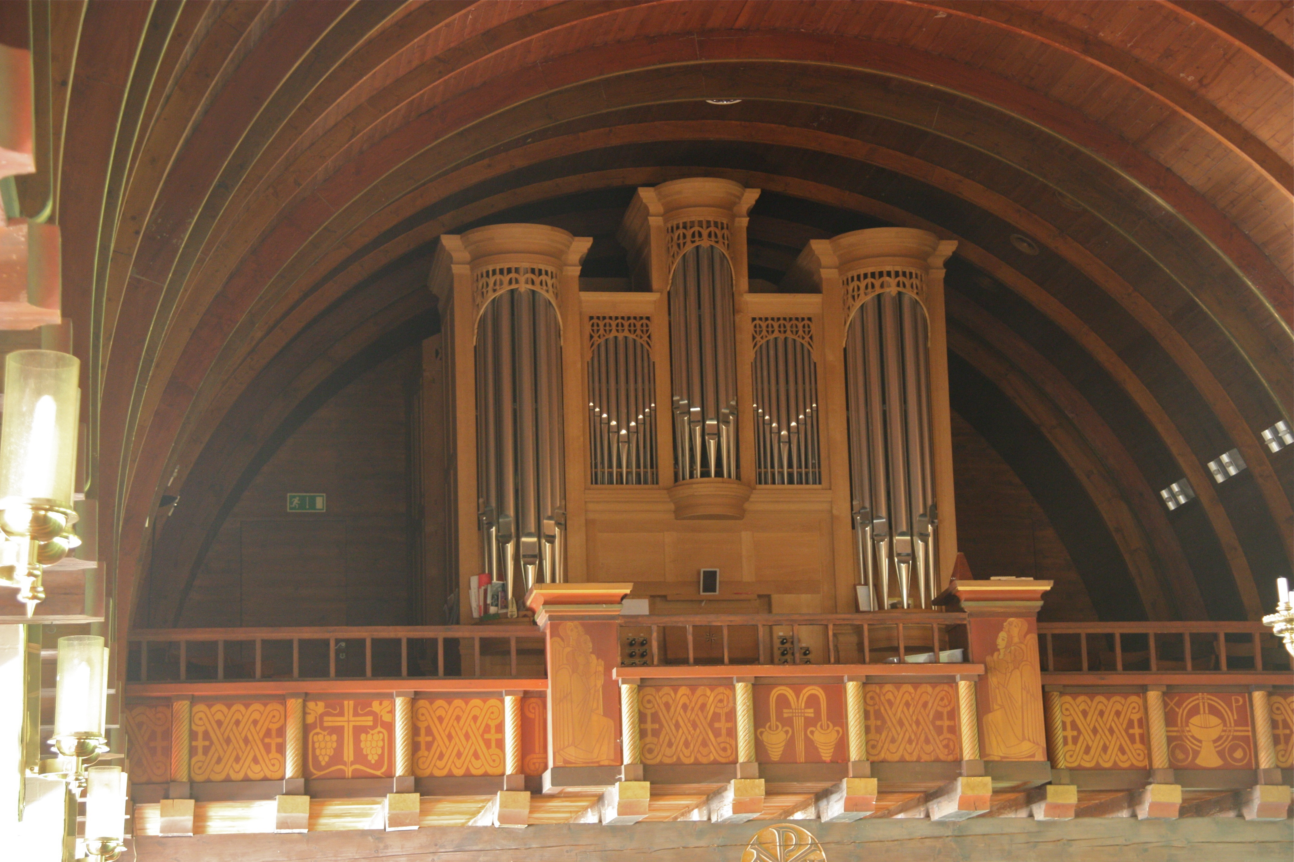 Hamburg, Fuhlsbüttel, Kirche St. Lukas, Orgelprospekt